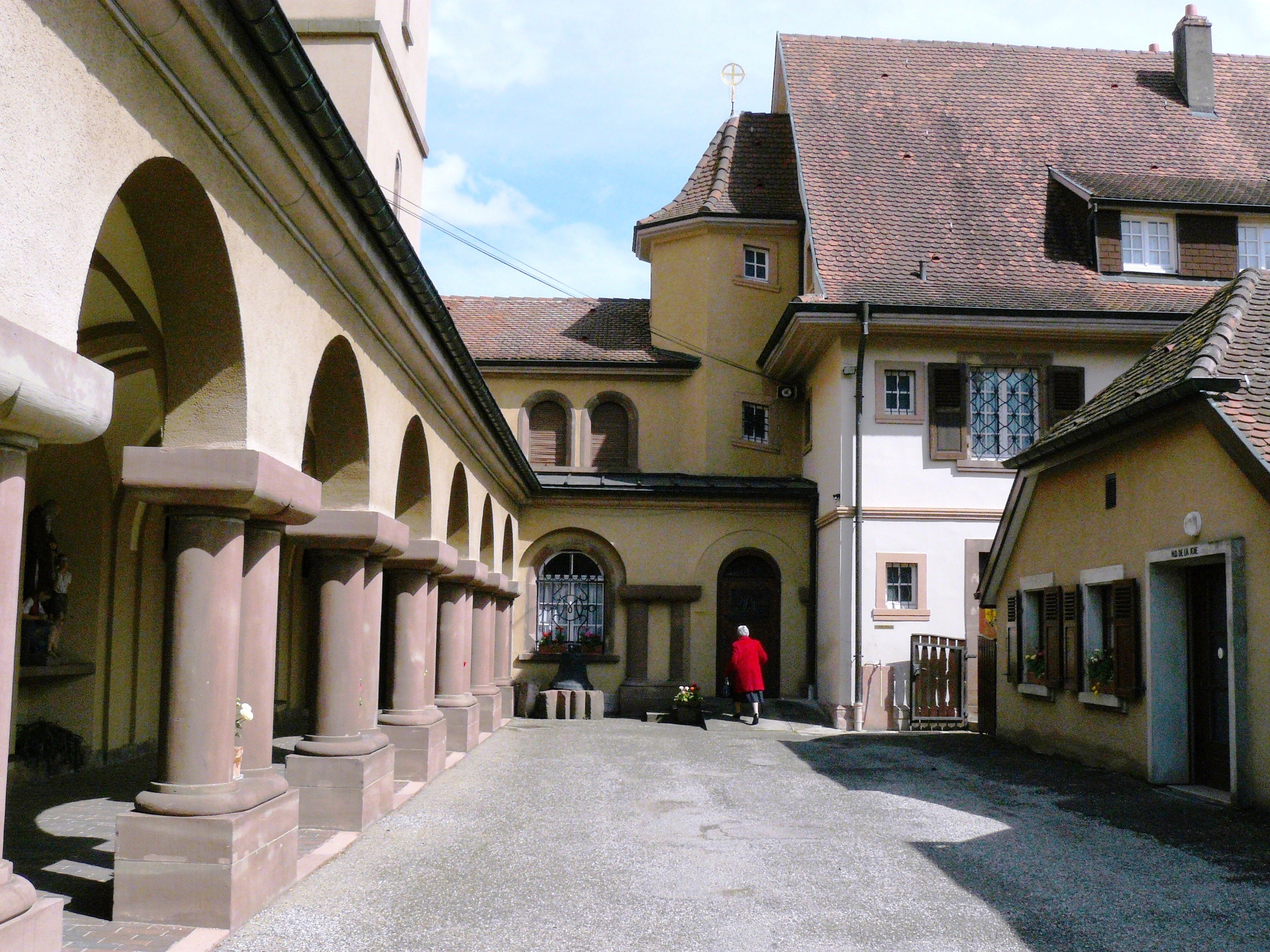 Une partie de l'ancien cloître du Prieuré de Thierenbach (Haut-Rhin).